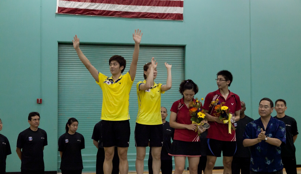 2011 US Open Badminton